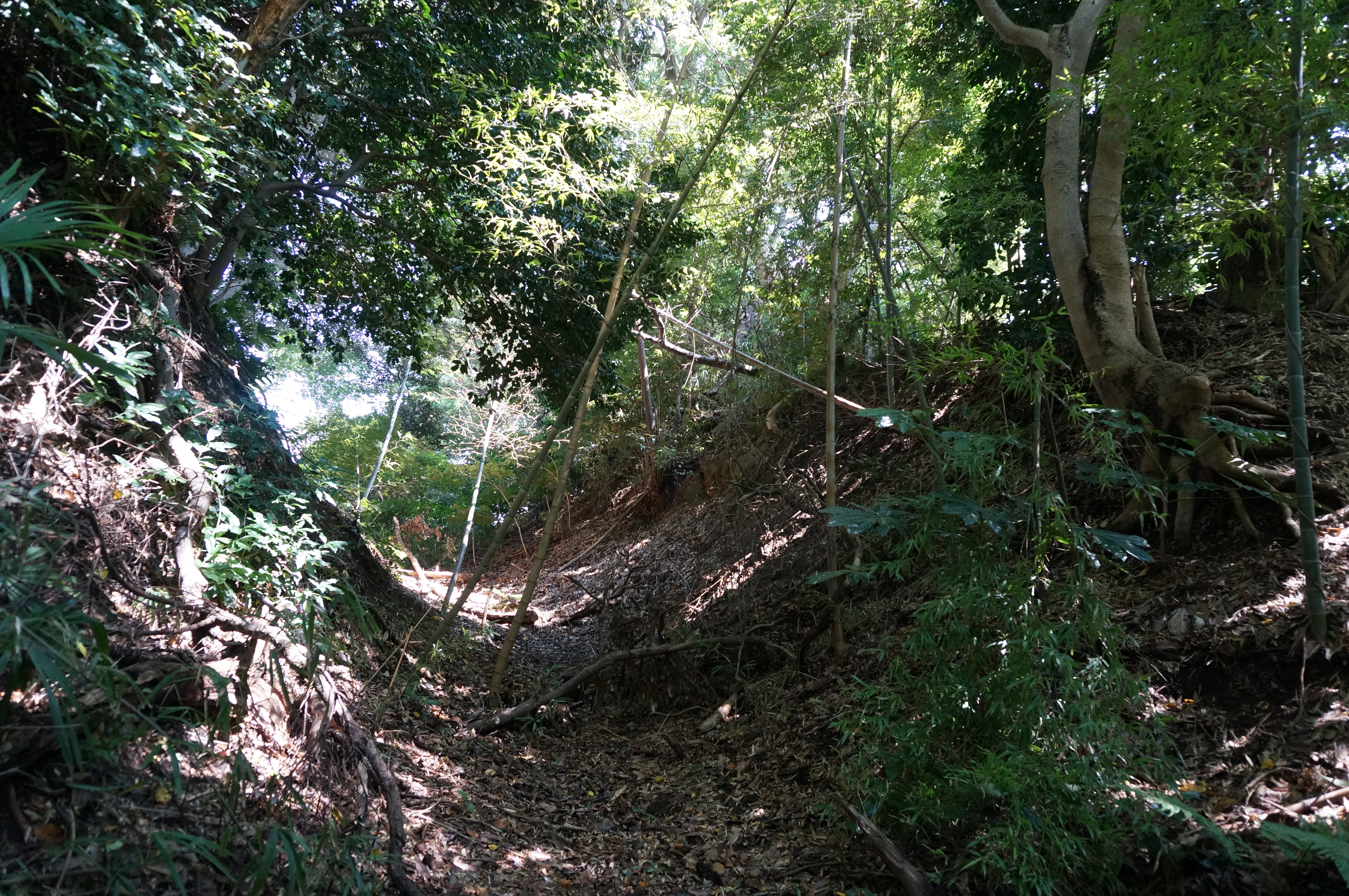 太鼓郭下の堀切